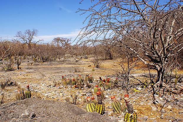 Caatinga (do tupi: ka'a [mata] + tinga [branca] = mata branca) é o único bioma[nota 1] exclusivamente brasileiro, o que significa que grande parte do seu patrimônio biológico não pode ser encontrado em nenhum outro lugar do planeta. Este nome decorre da paisagem esbranquiçada apresentada pela vegetação durante o período seco: a maioria das plantas perde as folhas e os troncos tornam-se esbranquiçados e secos. A caatinga ocupa uma área de cerca de 850.000 km², cerca de 10% do território nacional, englobando de forma contínua parte dos estados da Paraíba, Piauí, Ceará, Rio Grande do Norte, Maranhão, Pernambuco, Alagoas, Sergipe, Bahia (região Nordeste do Brasil) e parte do norte de Minas Gerais (região Sudeste do Brasil).